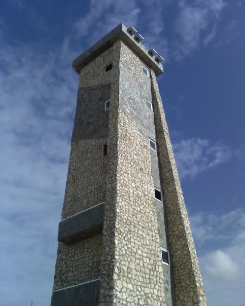 Faro del Cabo San Román visto desde abajo.